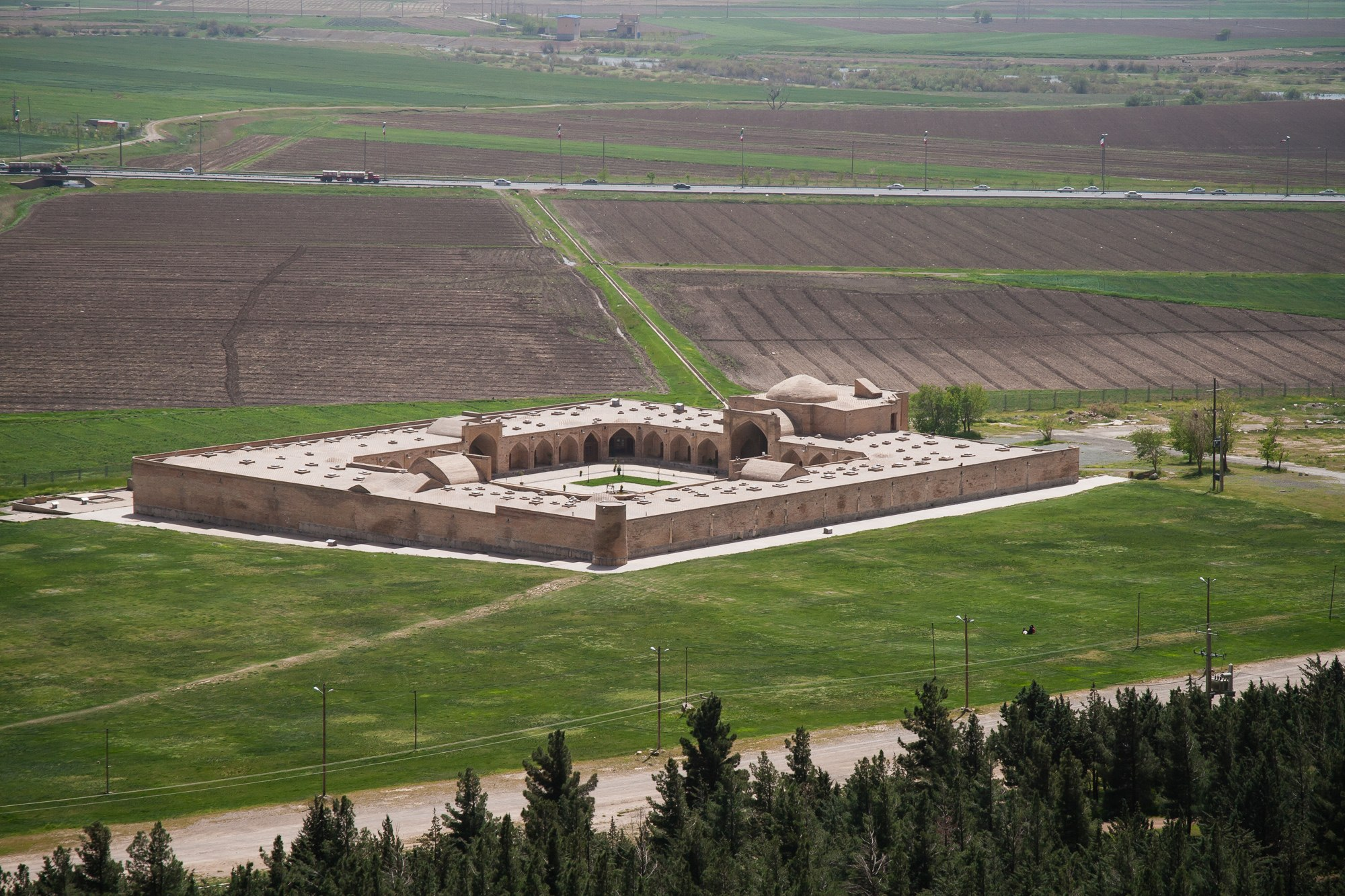 کاروانسرای عباسی در بیستون کرمانشاه